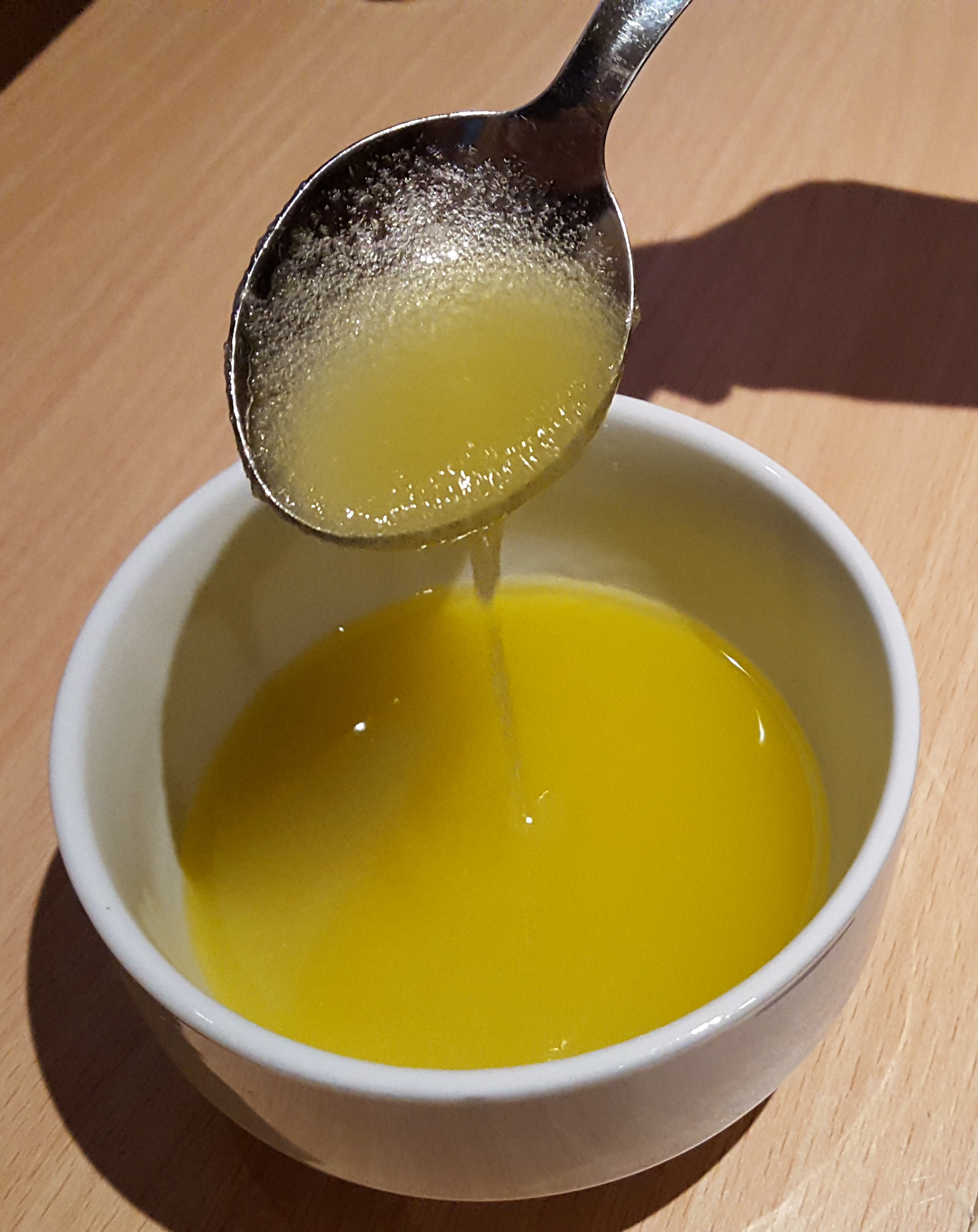 crema d'oli